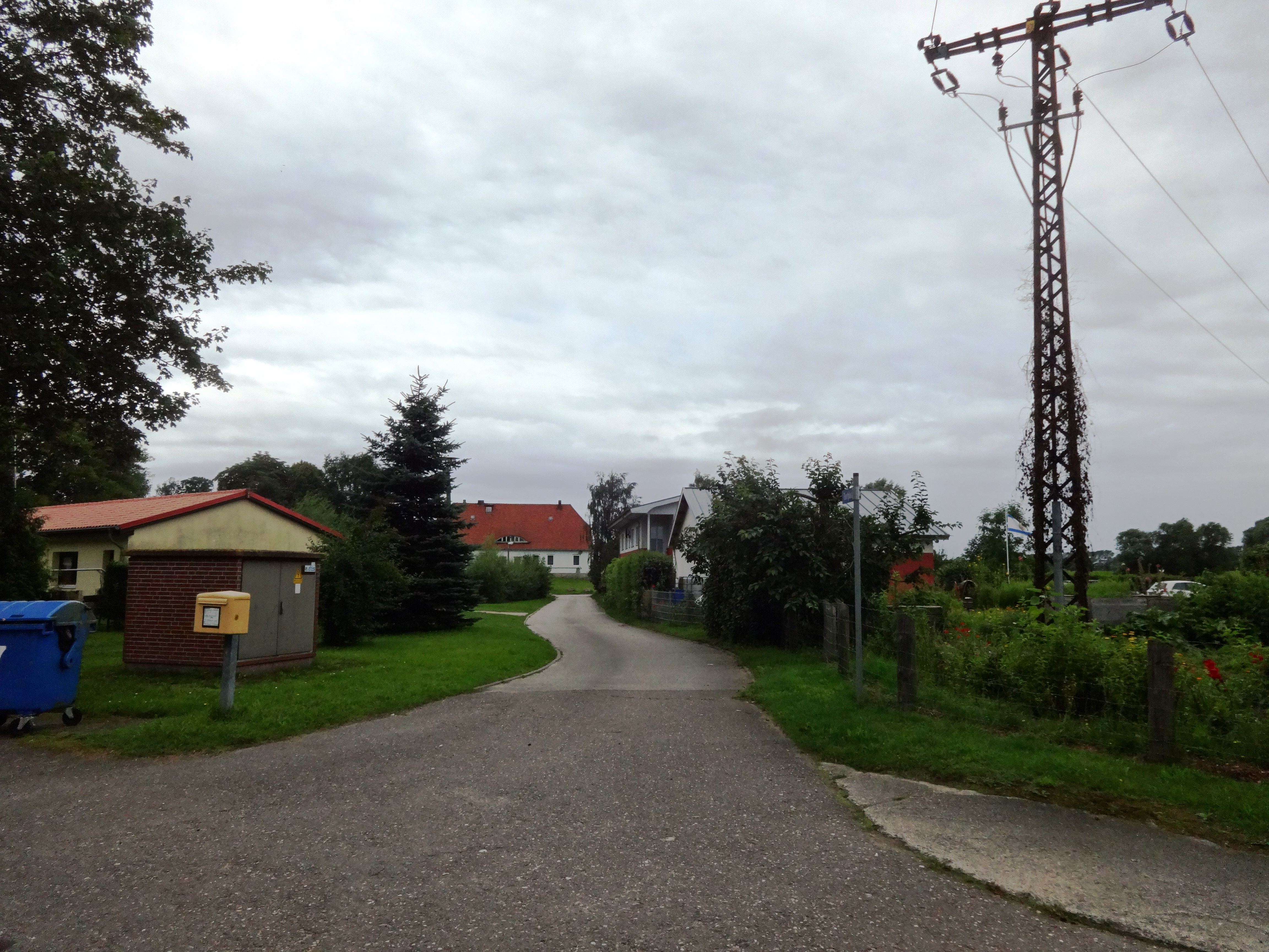 Dorfplatz in Klein Ernsthof, ein Ortsteil der Gemeinde Brünzow im Landkreis Vorpommern-Greifswald in Mecklenburg-Vorpommern